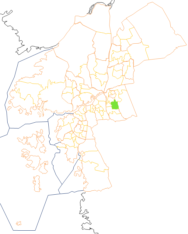 Karta som visar primärområdes belägenhet i Göteborg